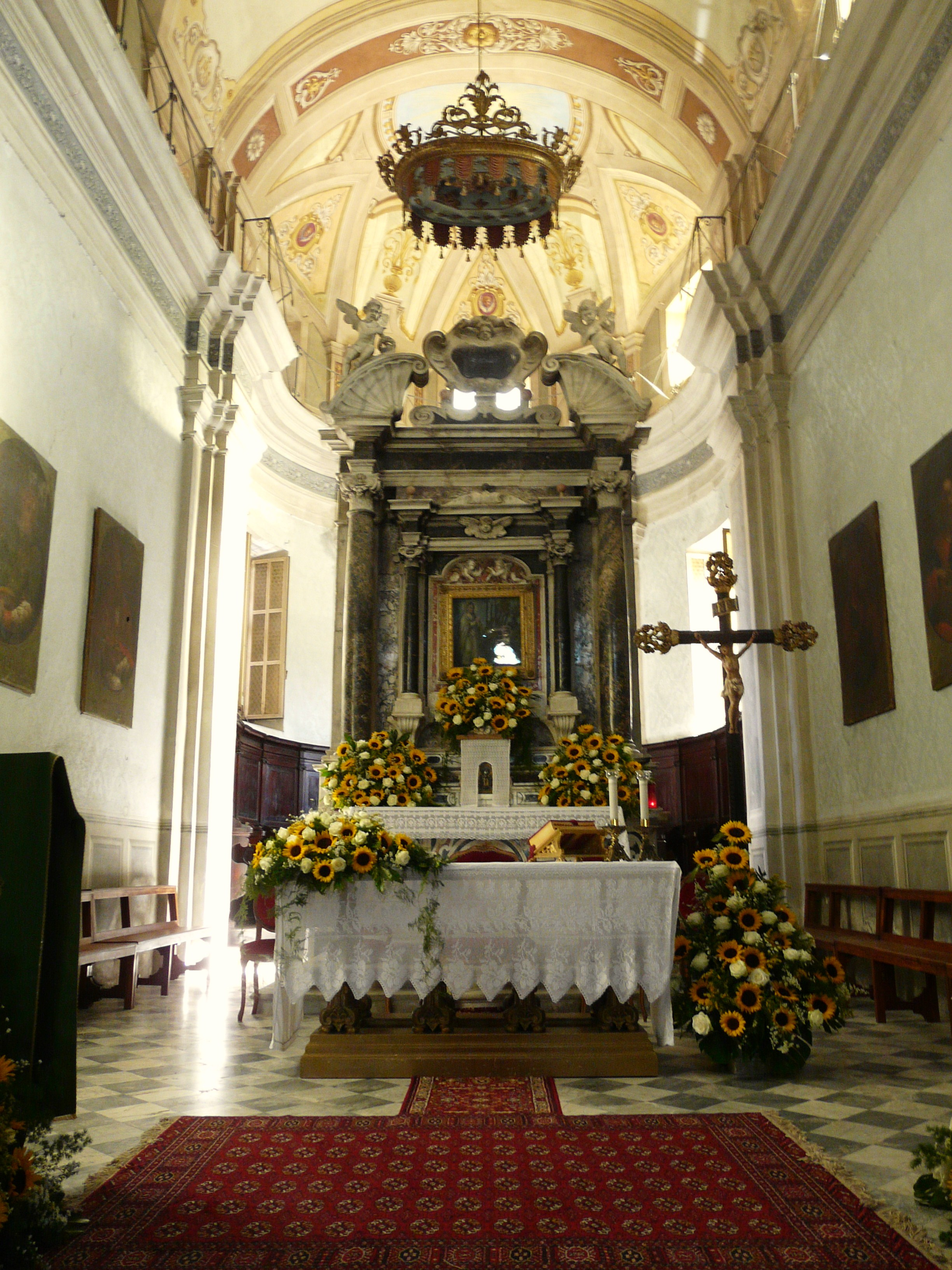 Altare maggiore del santuario di Nostra Signora delle Grazie di Ponzano Magra, Santo Stefano di Magra, Liguria, Italia